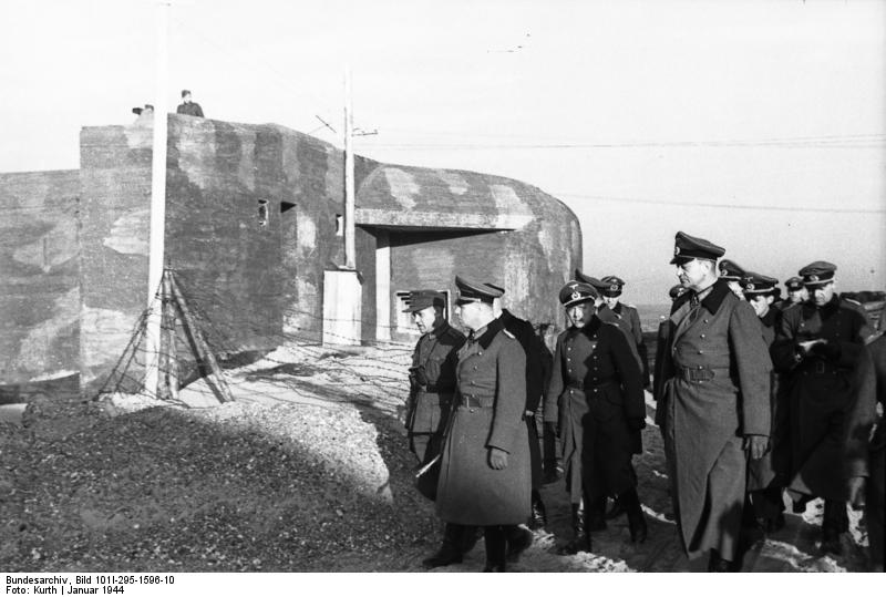 Generalfeldmarschall Rommel an der Kanalküste Im Rahmen seiner Besichtigungsreise im Westen besuchte Generalfeldmarschall Rommel auch die deutsche Verteidigungsanlage an der Kanalküste. U.B.z.: den Generalfeldmarschall bei der Besichtigung von Kampfstellungen und Bunkern, die unmittelbar an der Küste gelegen sind. PK-Kriegsbereichter Kurth 7.1.44